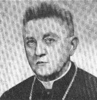 Jan Cais (1878 - 1950), Český římskokatolický kněz.